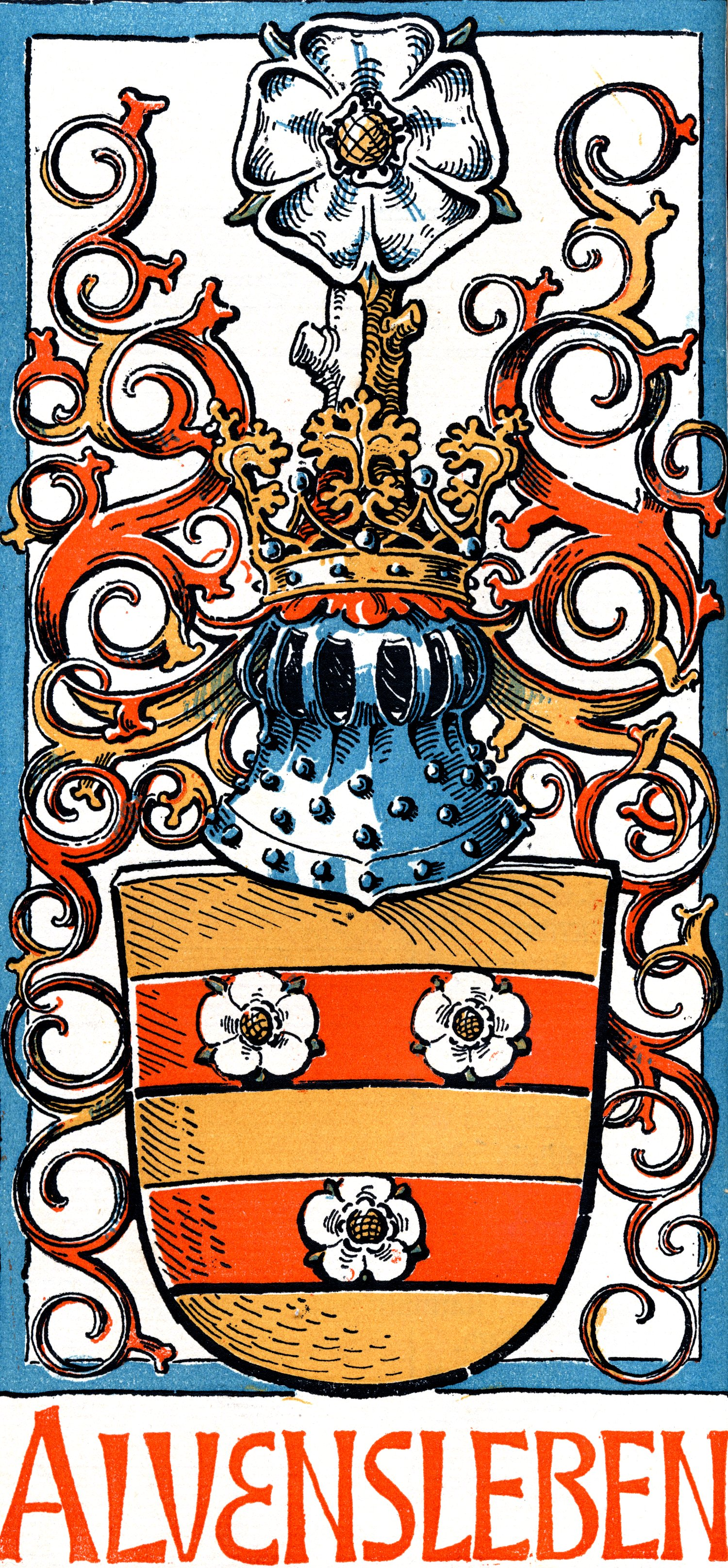 Wappen derer von Alvensleben